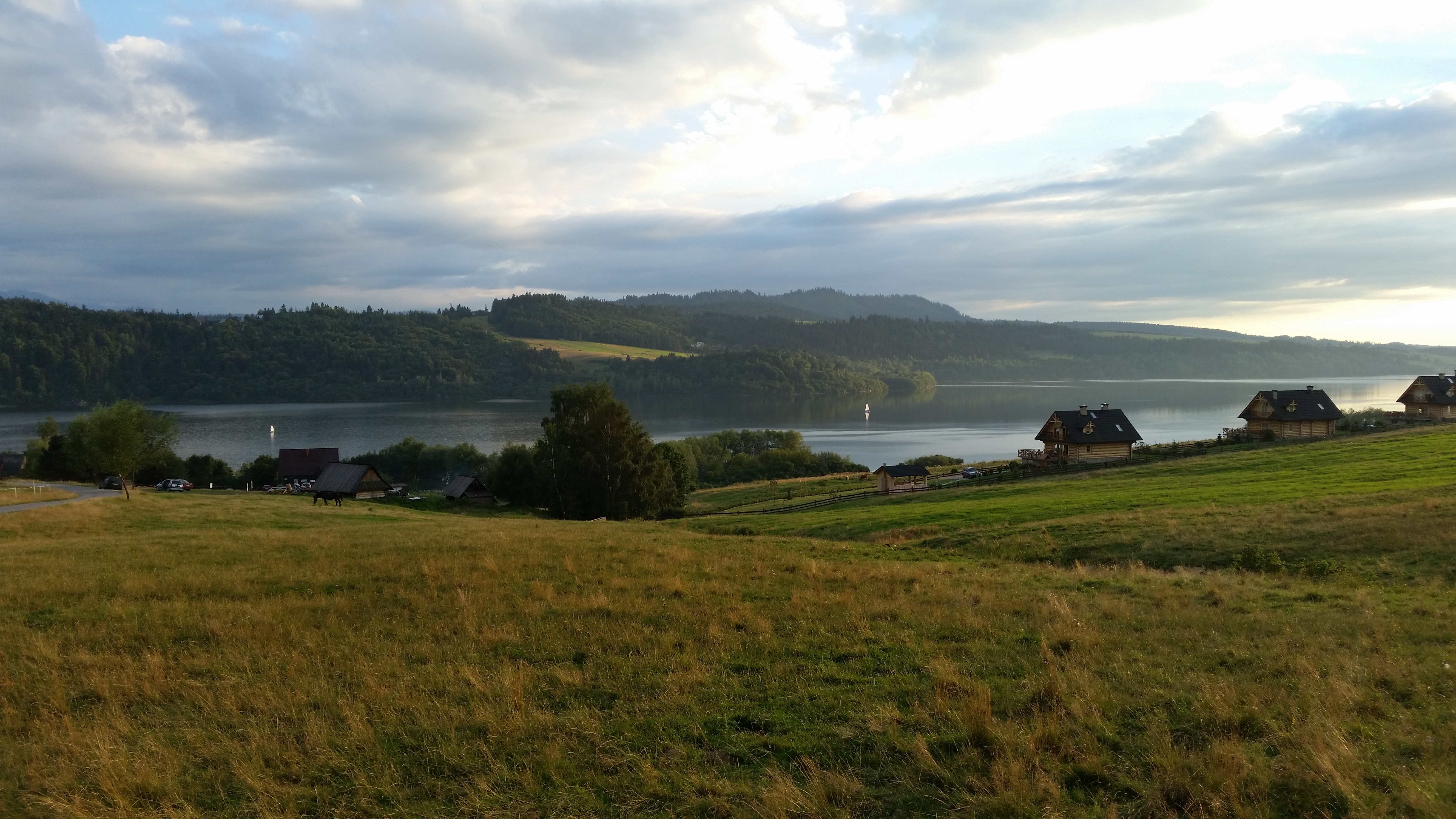 Kluszkowce